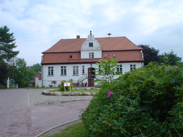 Ernst Moritz Arndt, house of birth